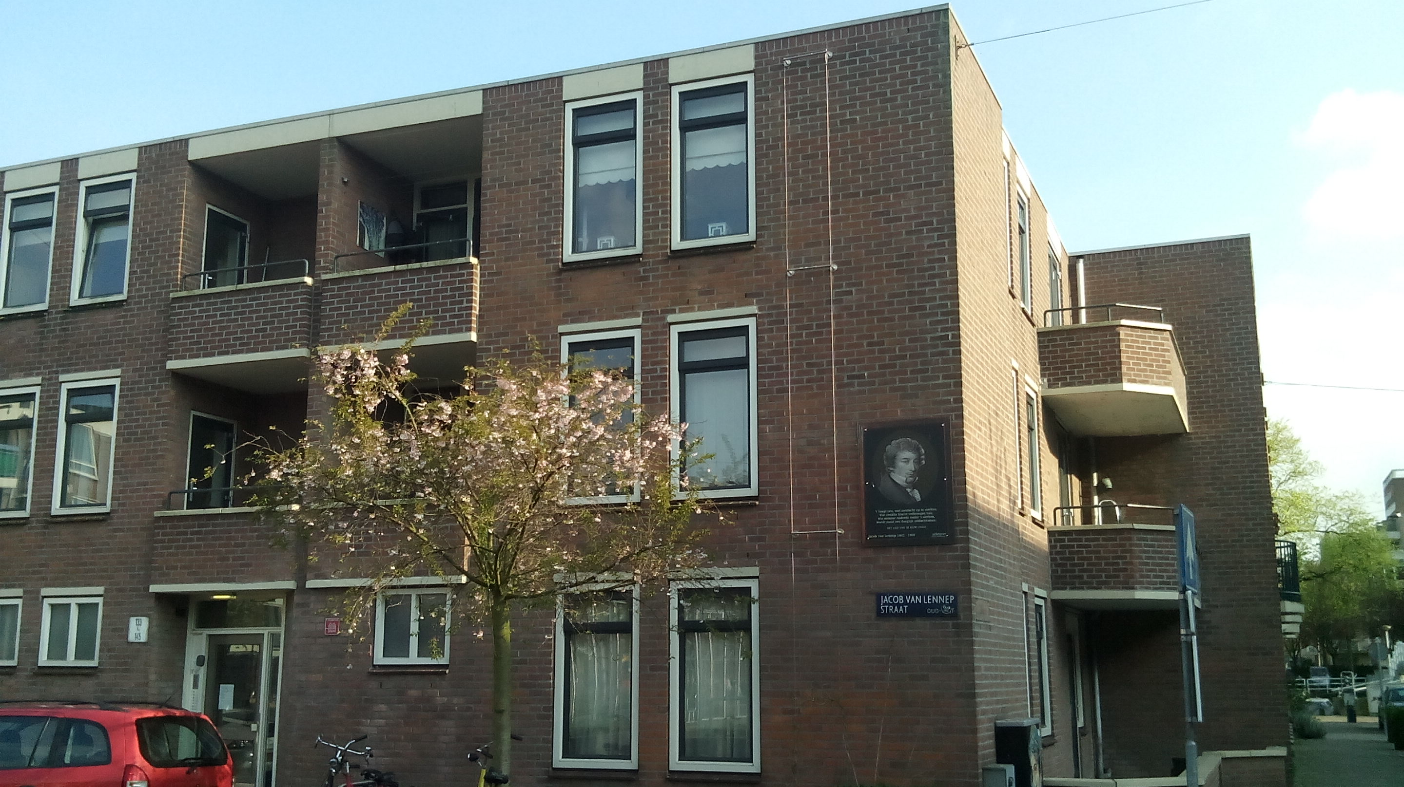 De Jacob van Lennepstraat, op een hoek met de Ten Katestraat, in Amsterdam-West, met een informatie bordje over Jacob van Lennep.